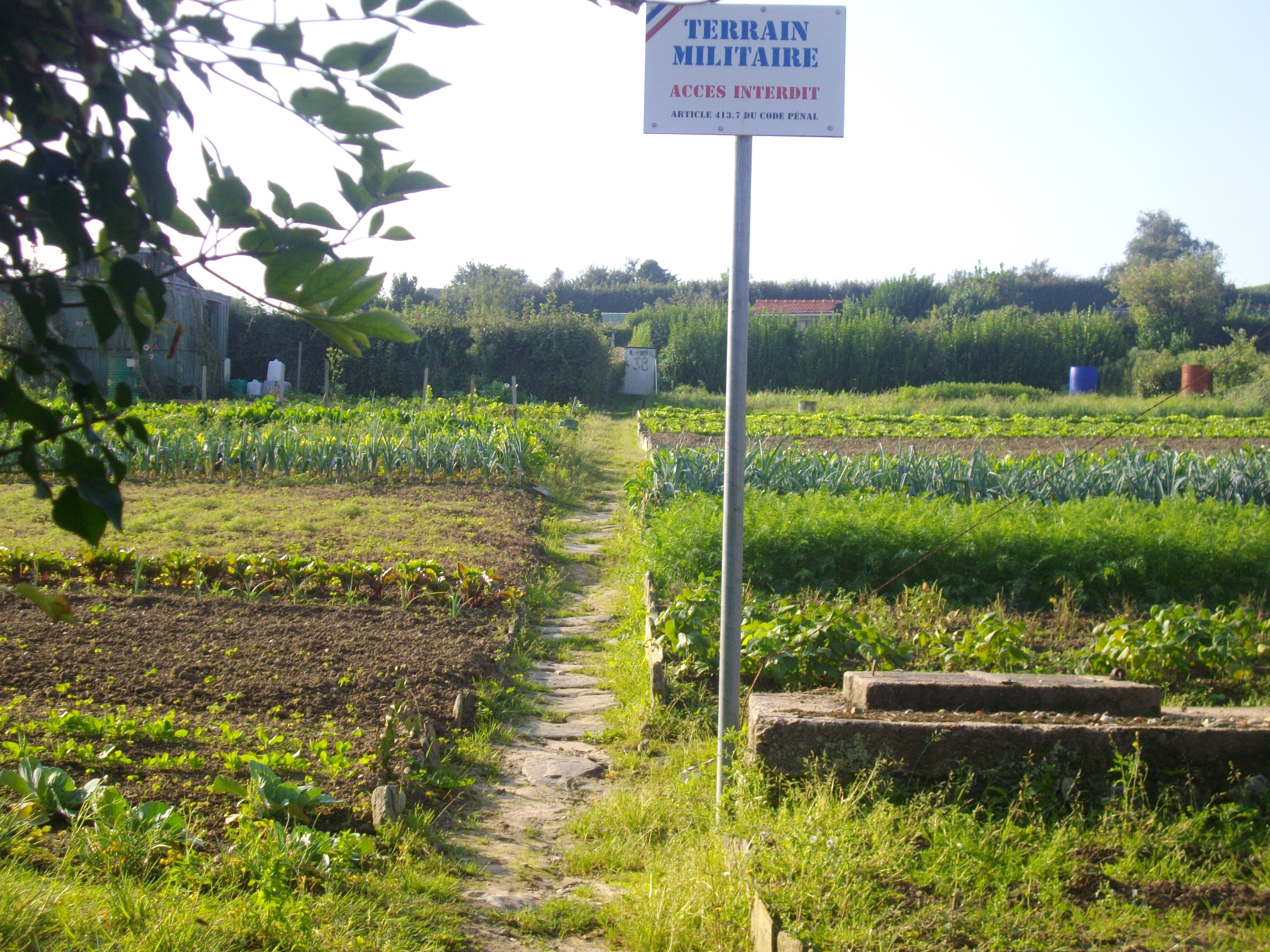 Des jardins familiaux aux abords de la chasse de la Valette, à Equeurdreville.